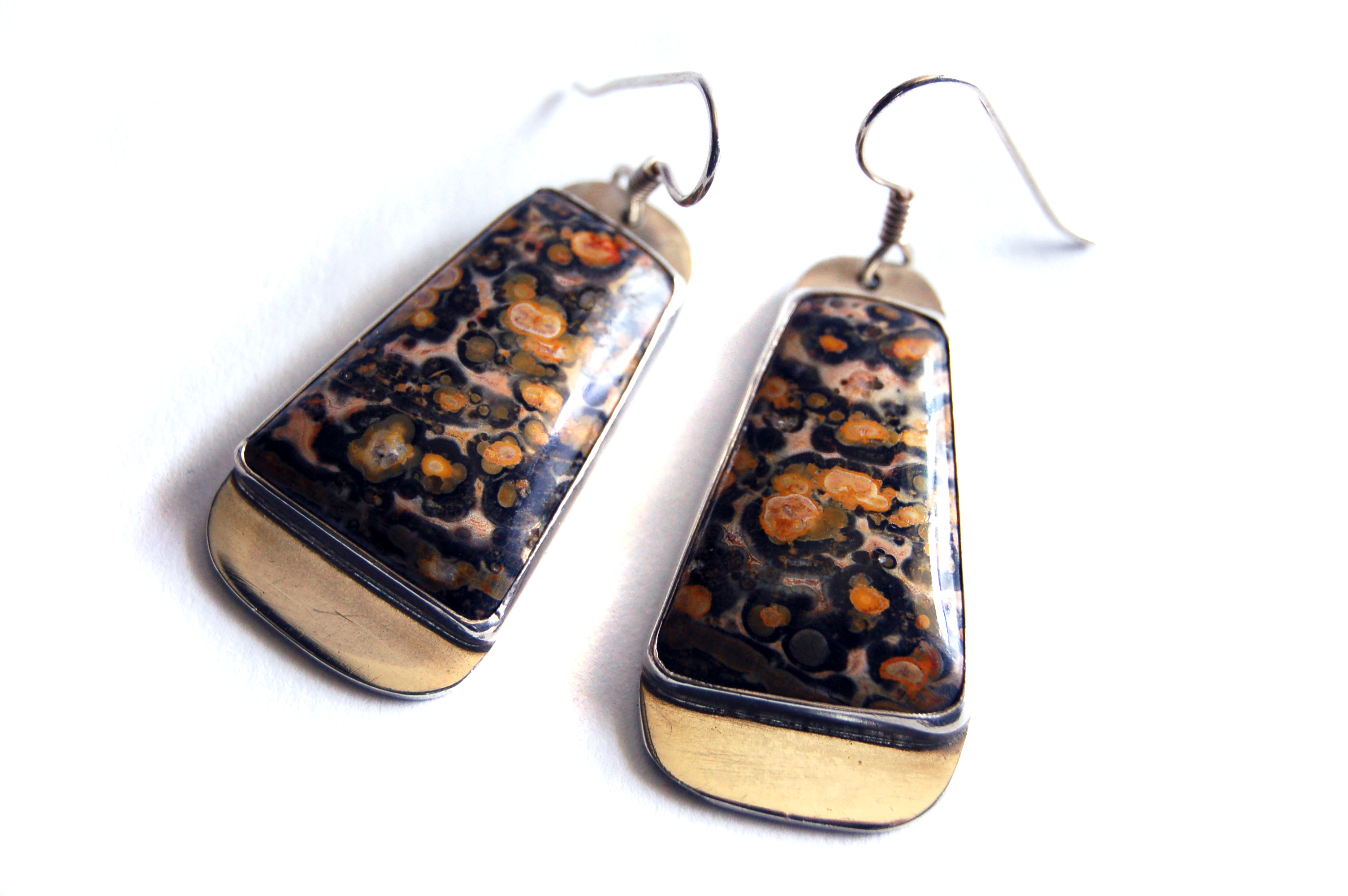 Zdjęcie przedstawiające biżuterię z jaspisem English | Polski | +/−